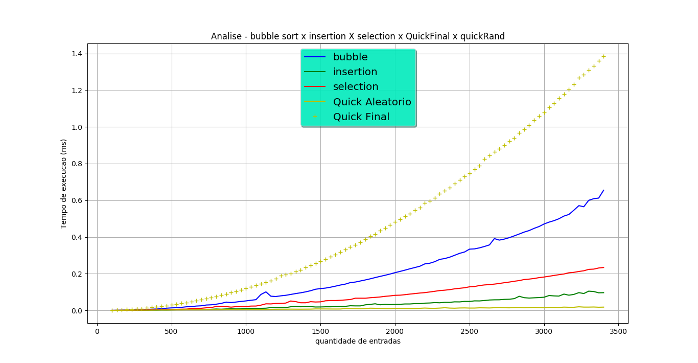 imagem construída com auxílio da biblioteca python matplotlib .